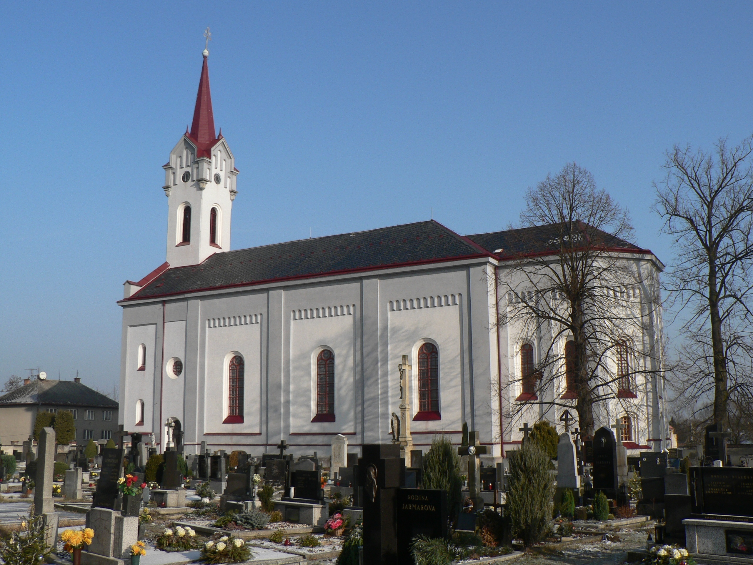 Kostel Neposkvrněného početí Panny Marie (Zvole)